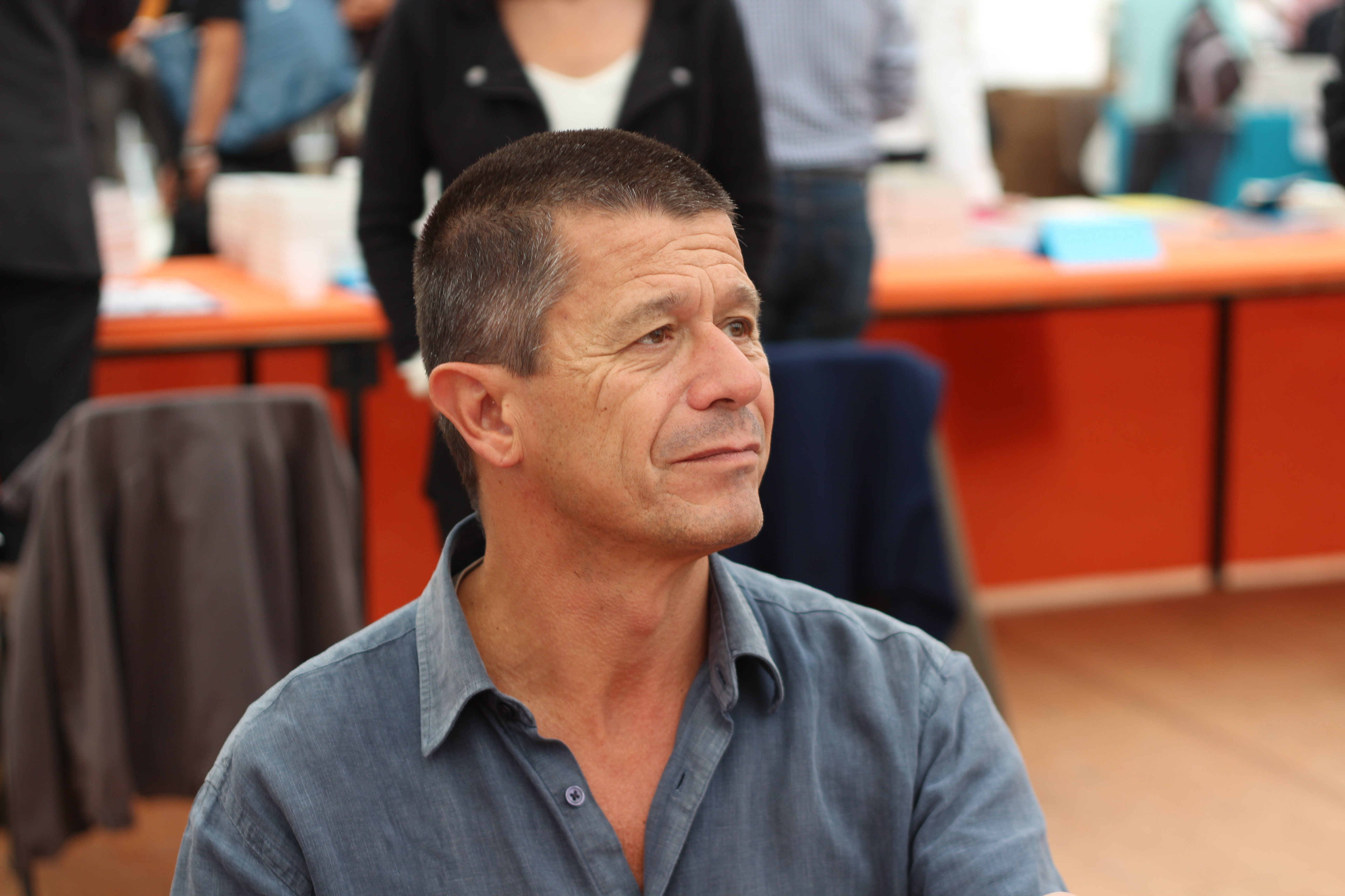 Emmanuel Carrère - Livre sur la Place 2014